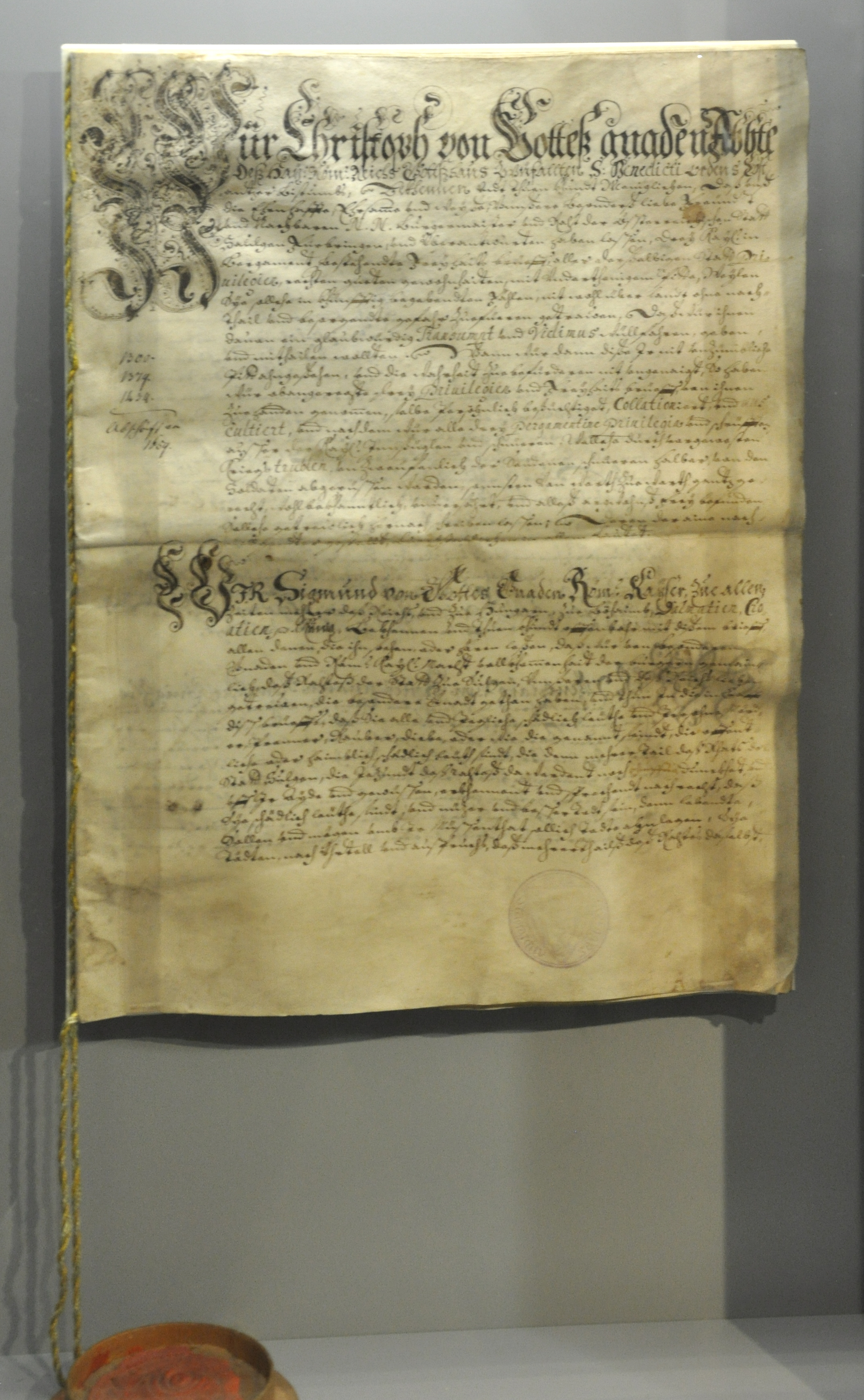 Urkunde, mit der Abt Christoph Raßler am 28. März 1659 in Zwiefalten folgende Abschriften beglaubigte: Verleihung des Ulmer Stadtrechts an Saulgau durch König Albrecht I. 1300 in Ulm; Befreiung Saulgaus von fremden Gerichten durch König Wenzel 1379 in Prag; Verleihung des Blutbanns an Saulgau durch Kaiser Sigismund 1434 in Ulm; Stadtmuseum Bad Saulgau